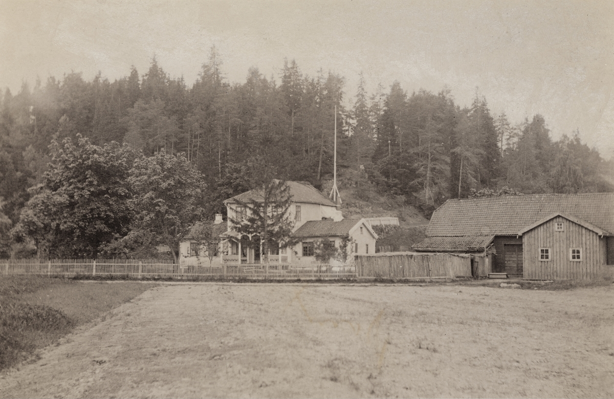 Karenslyst løkke, bolighus og uthus. Revet 1884.